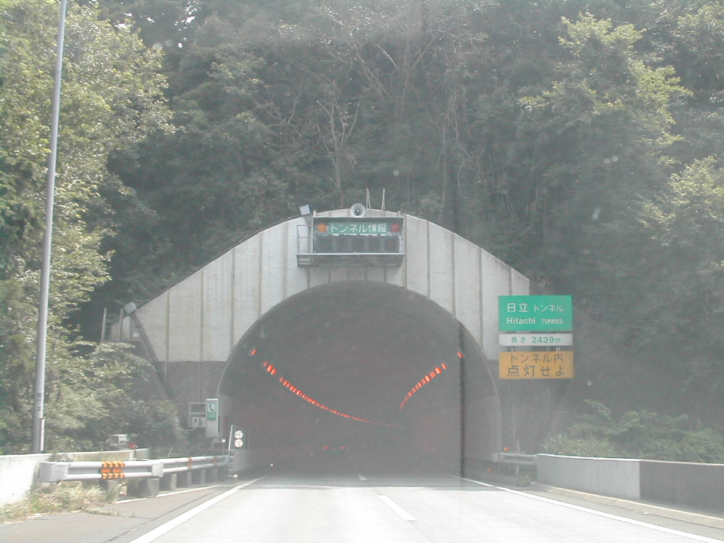 HitachiTN,ibaraki,Japan